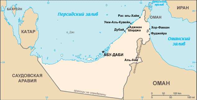 Russian map of the United Arab Emirates (wp-EN) / Карта Объединённых Арабских Эмиратов (wp-RU)